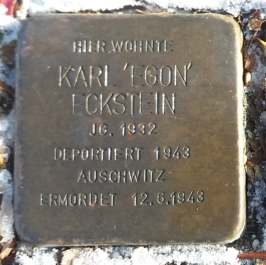 Stolperstein für Karl Egon Eckstein, Mitglied der Großfamilie Eckstein, Vöhringen (Iller)